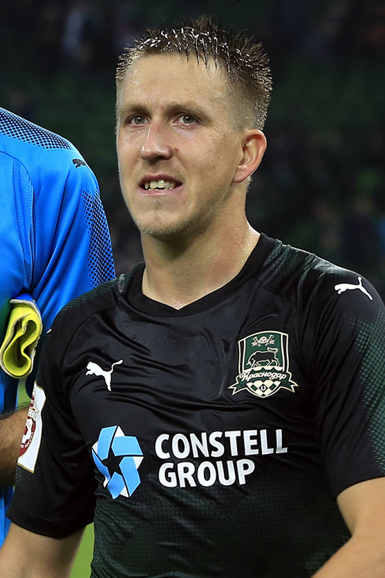 Смолов и Ко показали характер в игре с «Ахматом»